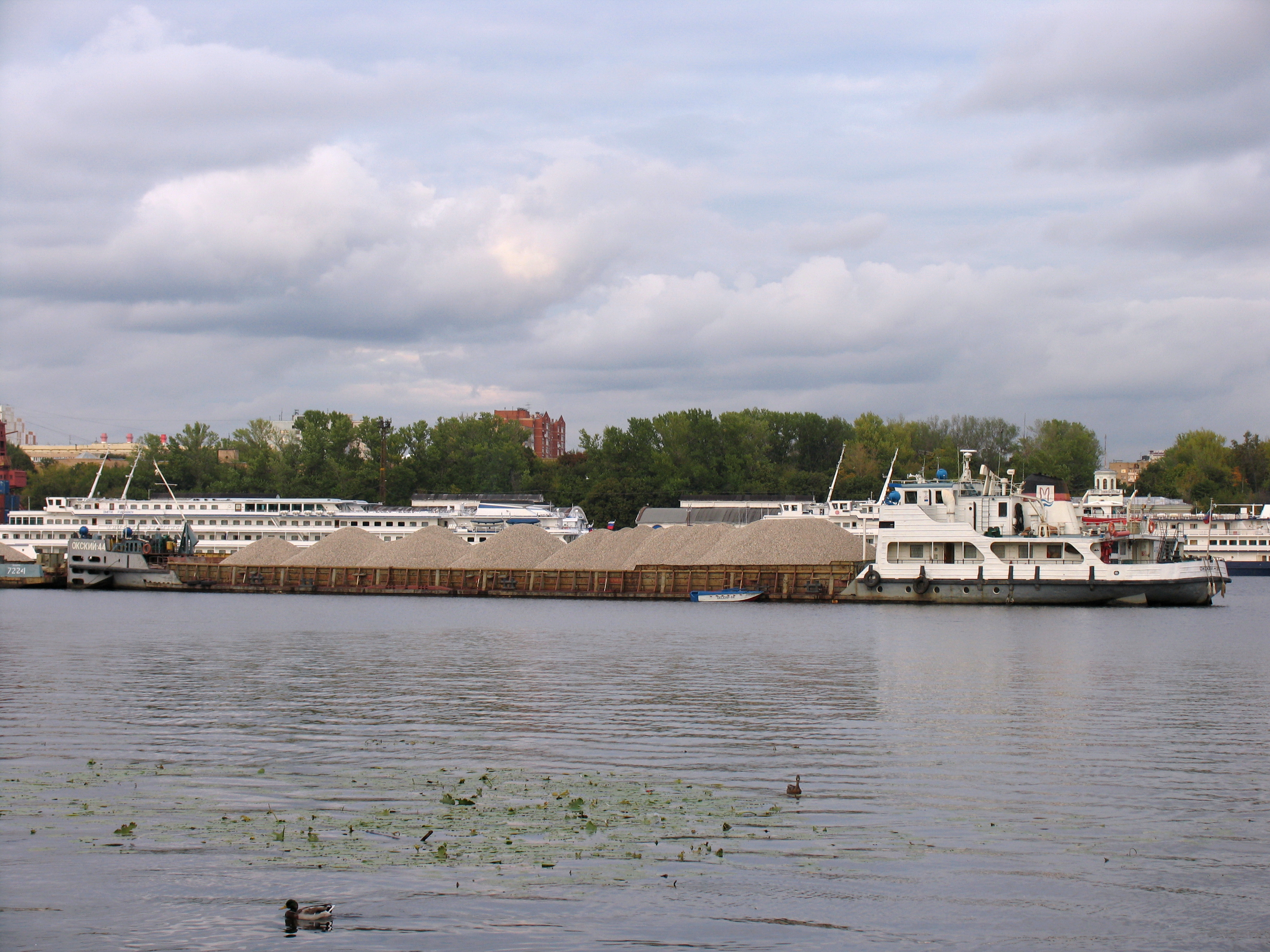 Речное грузовое судно "Окский-44" на Химкинском водохранилище.